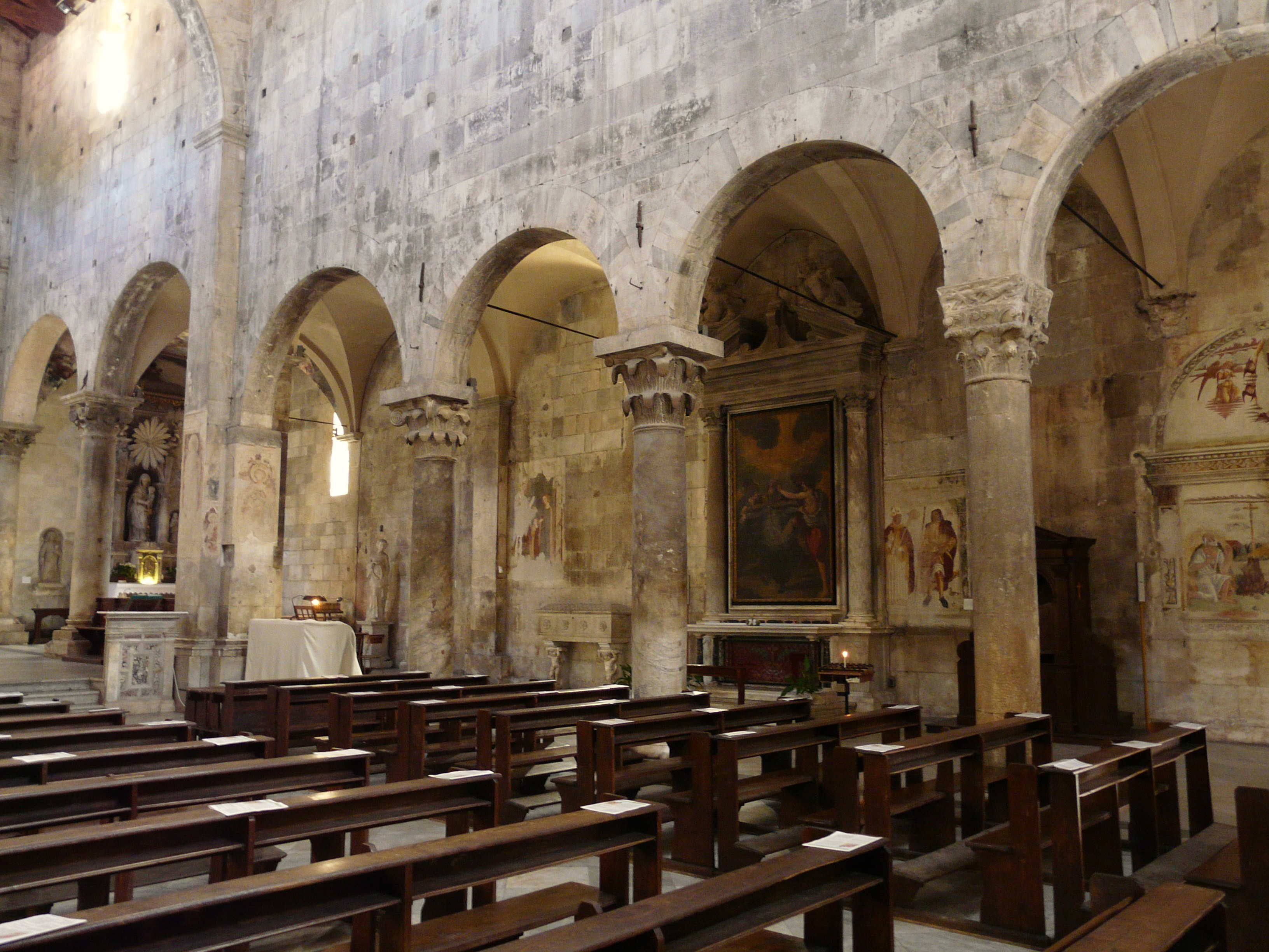 Navata destra della cattedrale di Carrara, Toscana, Italia